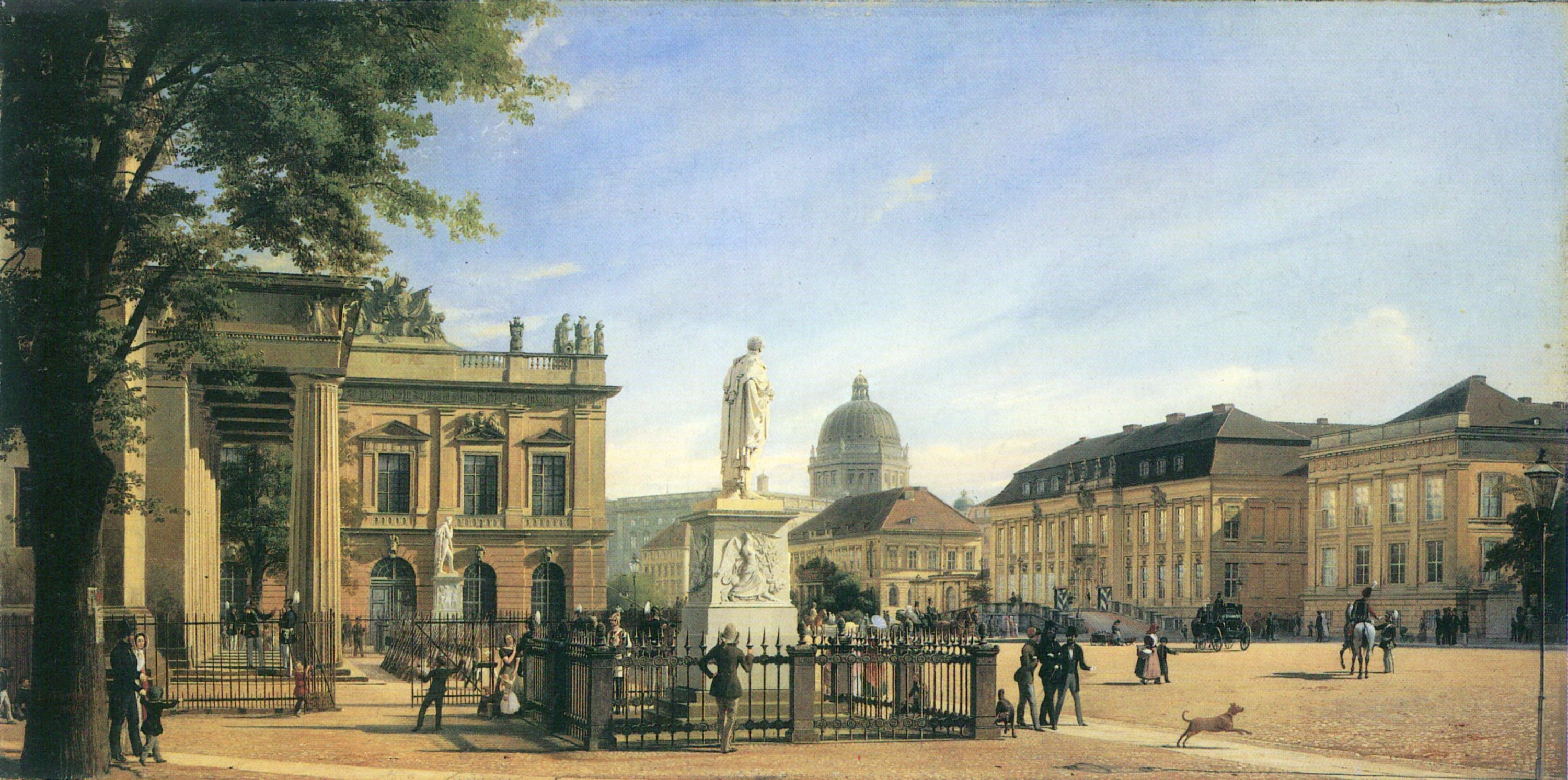 Вид на дворец Кронпринца в Берлине